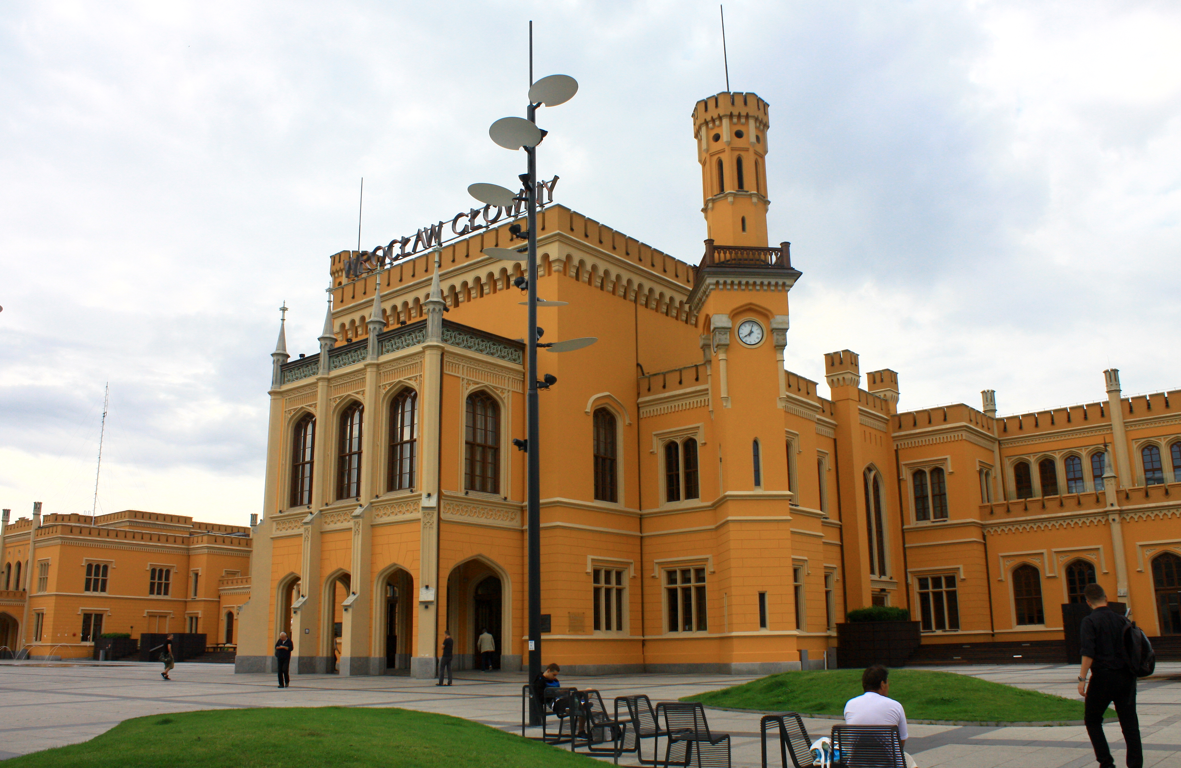 Wrocław, Dworzec Główny, 1856, 1899-1904